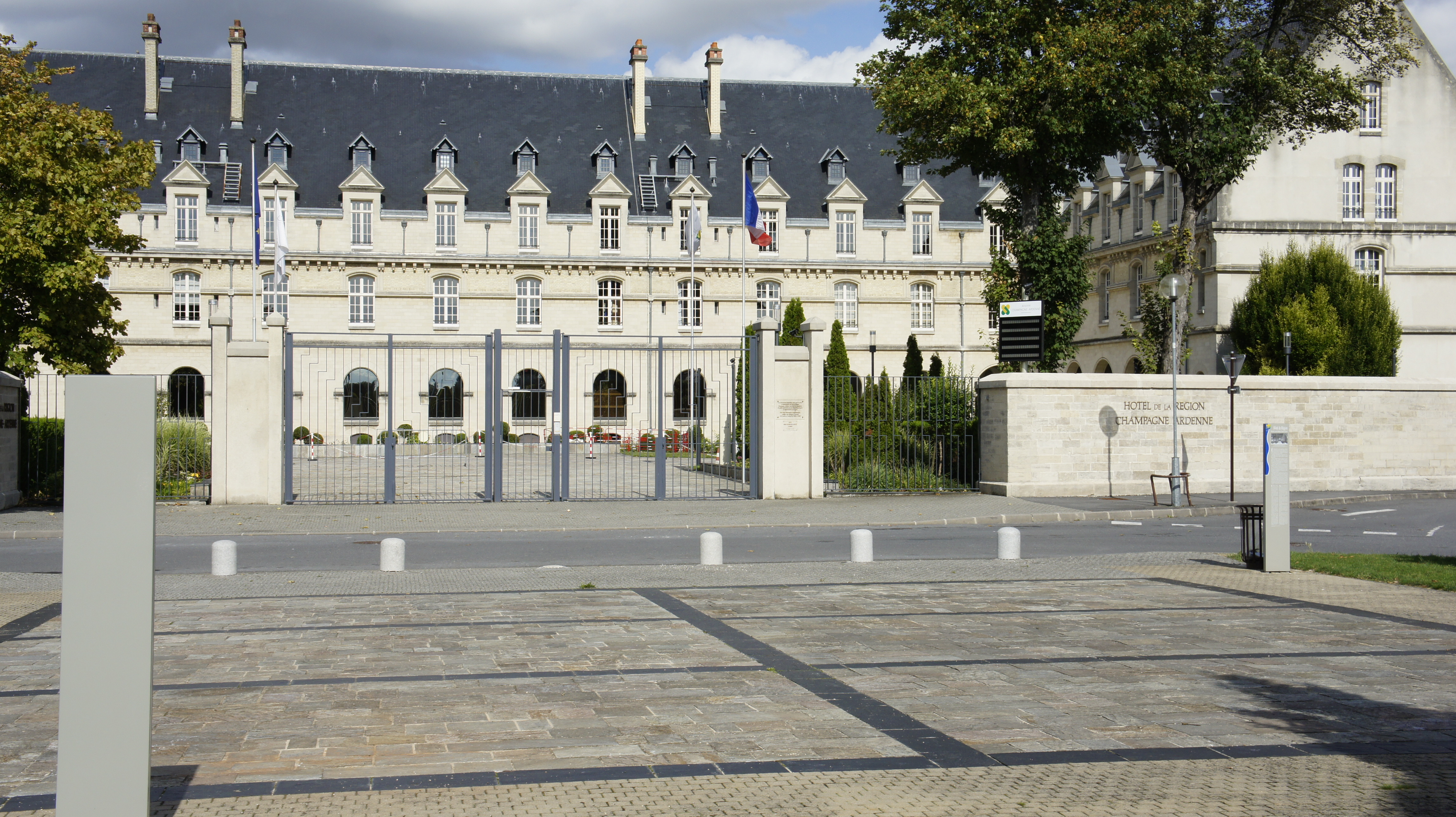 L'Hôtel de région de la Champagne-Ardenne vu depuis la place sainte-croix.